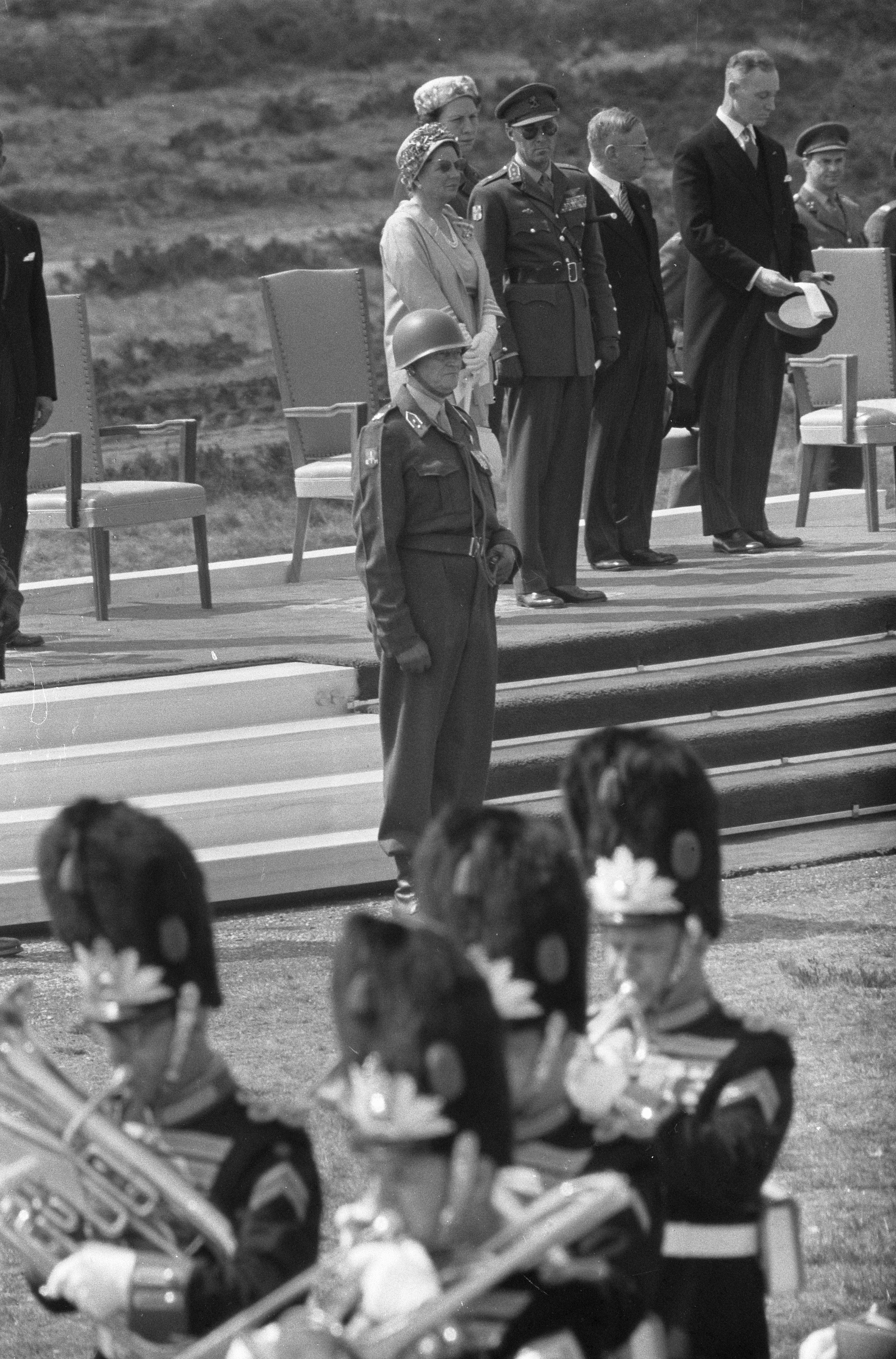 Collectie / Archief : Fotocollectie Anefo Reportage / Serie : [ onbekend ] Beschrijving : Militaire parade bij Ede voor koningin Juliana en prins Bernhard Datum : 5 mei 1960 Locatie : Ede, Gelderland Trefwoorden : koninginnen, militaire parades, muziekkorpsen Persoonsnaam : Bernhard (prins Nederland), Juliana (koningin Nederland) Fotograaf : Pot, Harry / Anefo Auteursrechthebbende : Nationaal Archief Materiaalsoort : Negatief (zwart/wit) Nummer archiefinventaris : bekijk toegang 2.24.01.05 Bestanddeelnummer : 911-2199